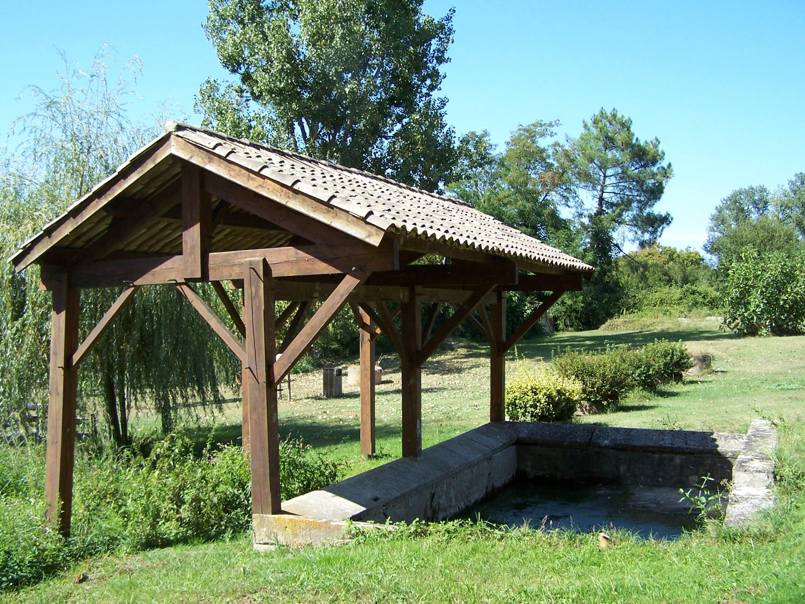 Lavoir à Auros, Gironde, France